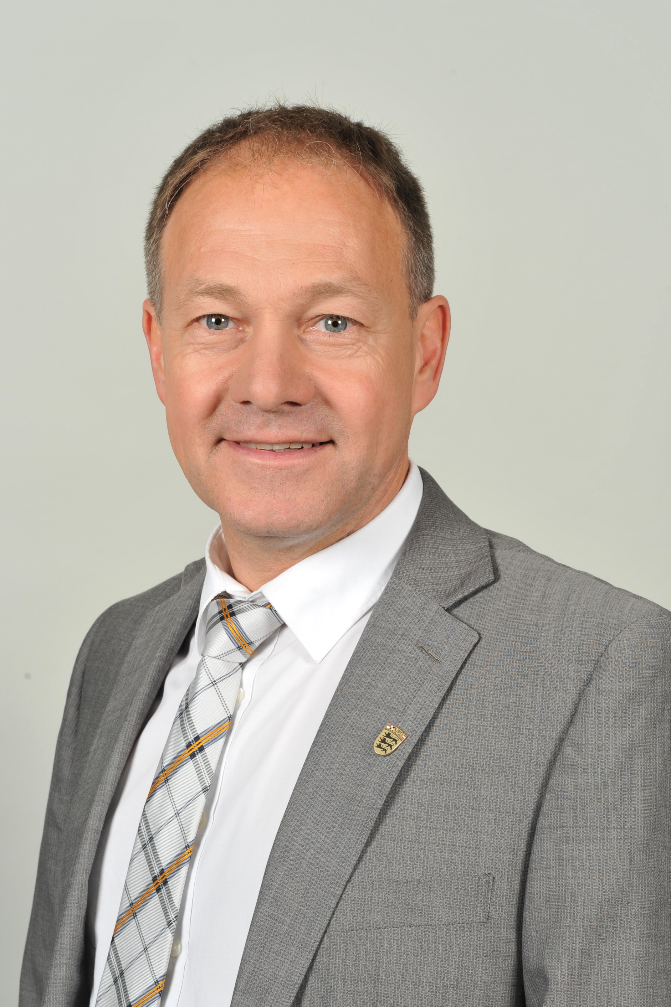 Landtagsprojekt Baden-Württemberg 2013: Hans-Peter Storz